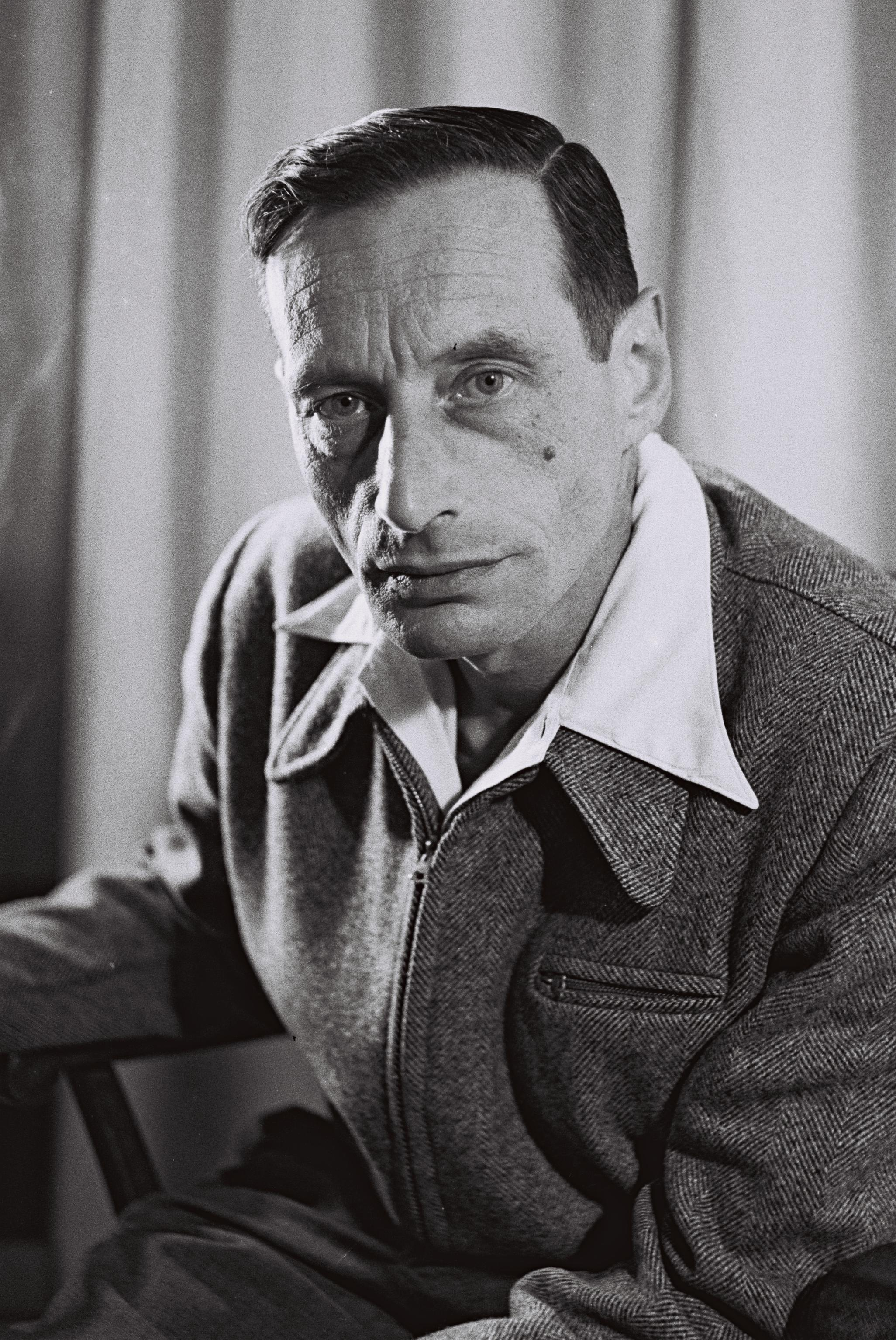 Herzl Berger